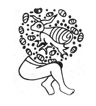 Glifo tiponómico de Nicolás Romero